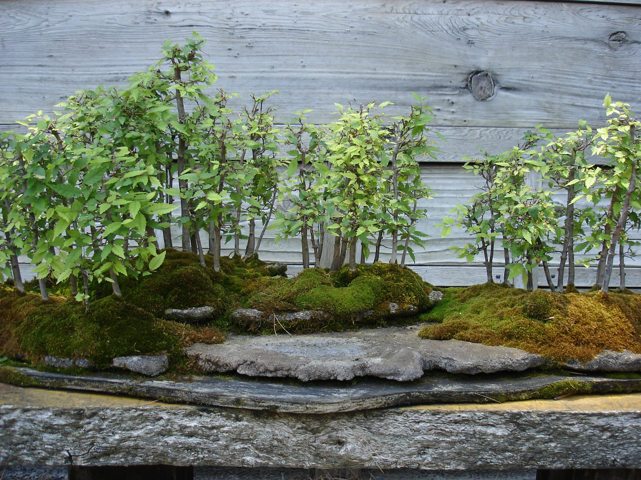 Little Trees